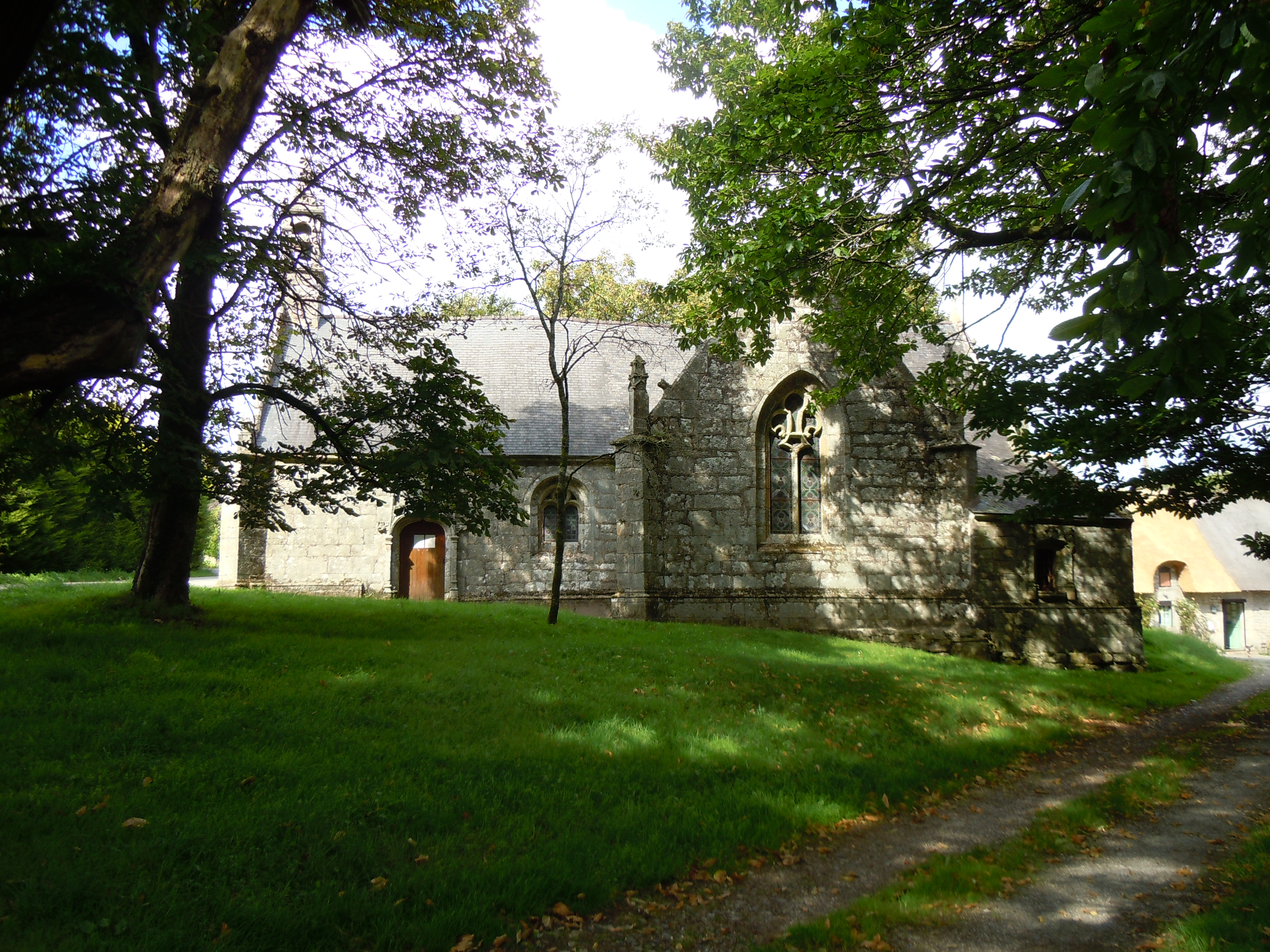 la chapelle Notre-Dame-de-la-Clarté dans le hameau de Saint-Éloi (Guilligomarc'h), de style gothique flamboyant, datée du premier quart du XVIe siècle, commune de Guilligomarc'h, département du Finistère, France.